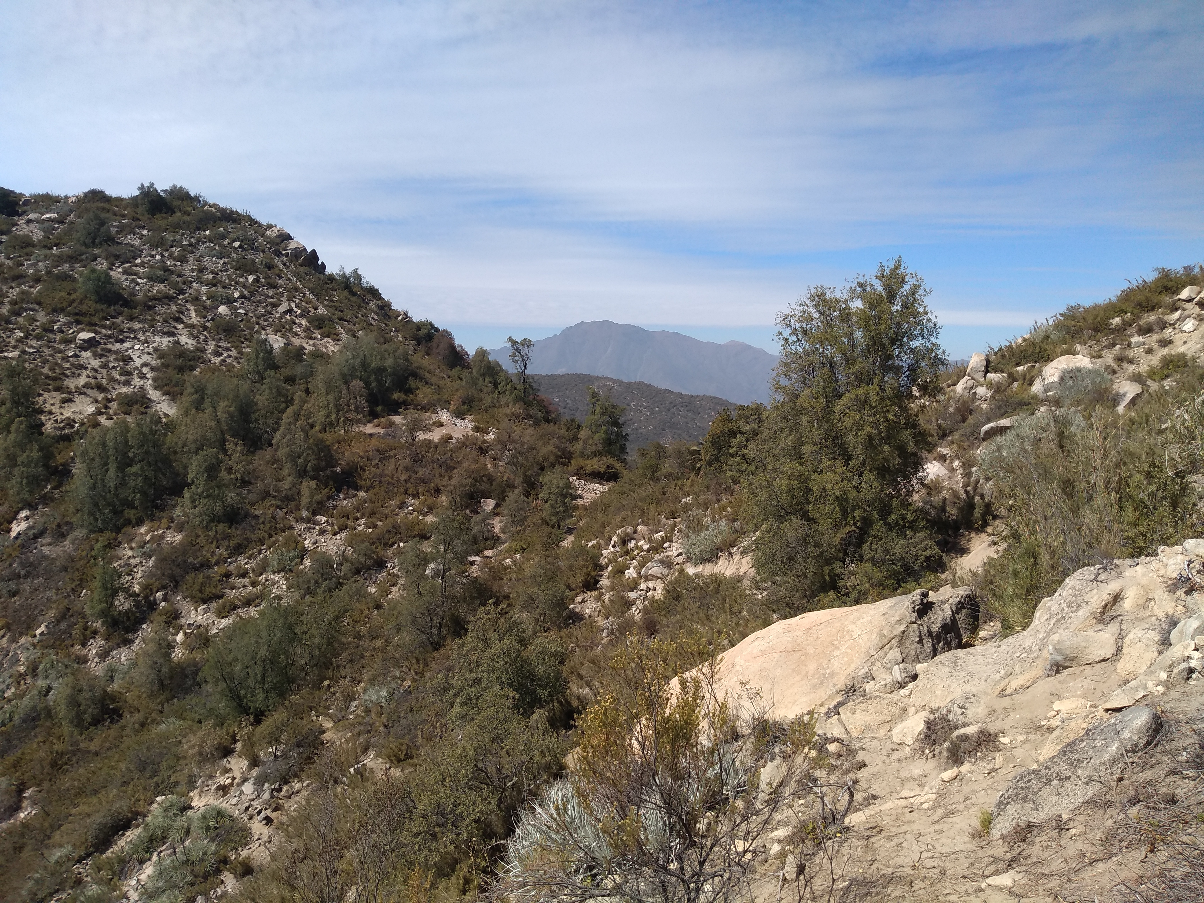 Parque nacional La Campana, cara de exposición norte en el sector del Portezuelo de Ocoa, mirando hacia el sur